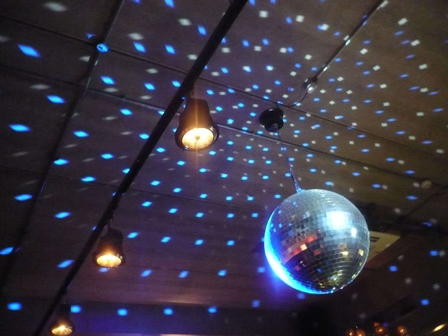 Disco ball in blue